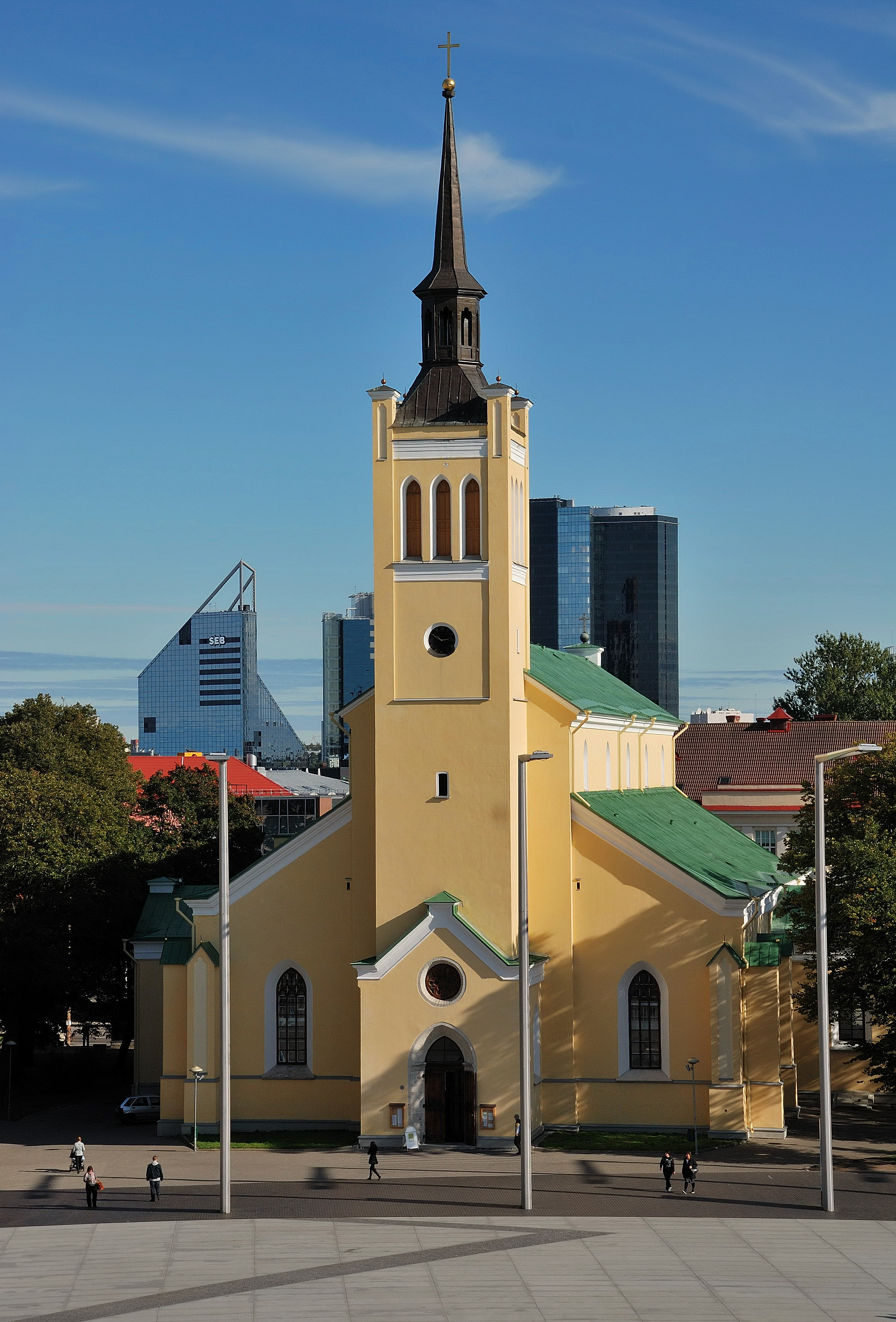 Jaani kirik Vabaduse väljaku serval